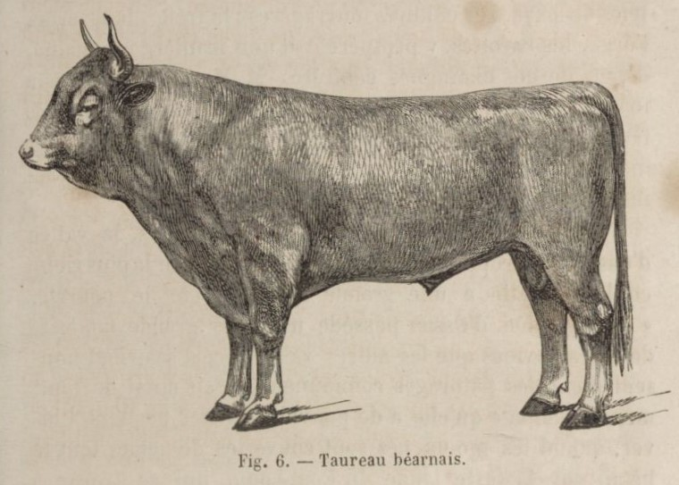 Illustration d'un taureau béarnais.